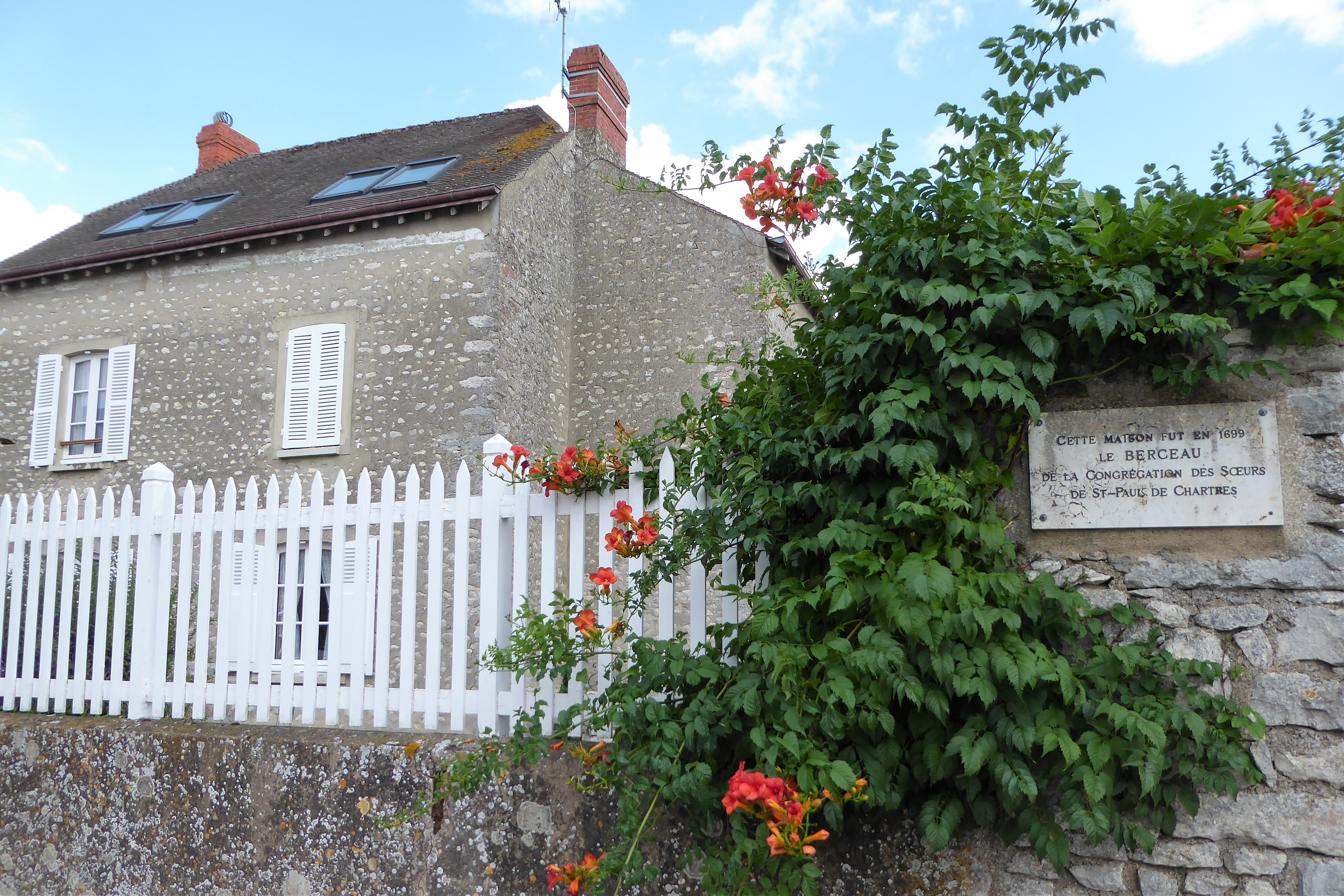 maison berceau des sœurs de Saint-Paul de Chartres en 1699, Levesville-la-Chenard, Eure-et-Loir, France.